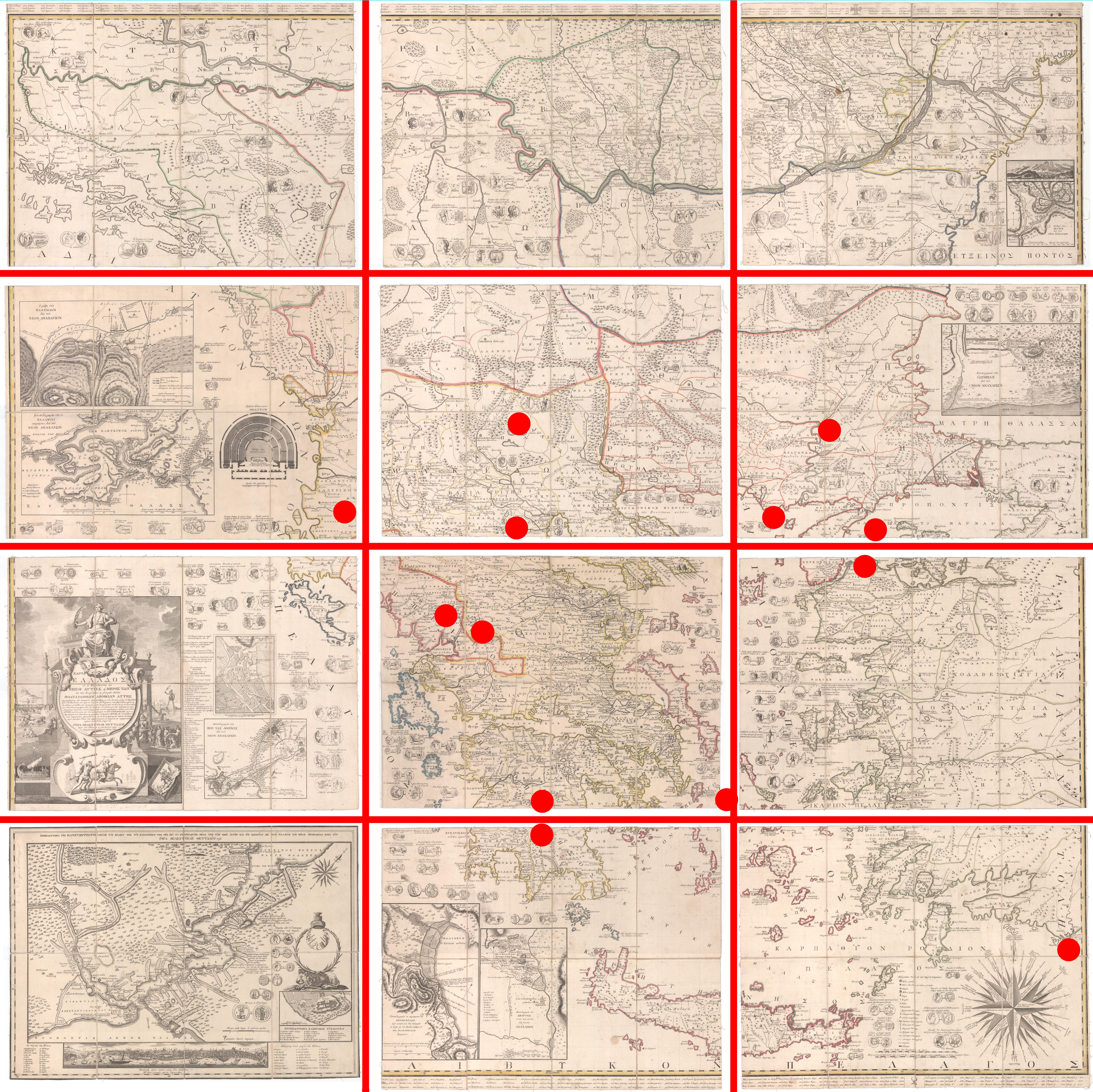 Τα σημεία στα οποία εντοπίζονται οι διαφορές των Τύπων Α και Β της Χάρτας και αφορούν την προσθήκη στον Τύπο-Β ενός δρόμου, ενός σχολίου, ενός συμβόλου όρους, έξι τοπωνυμίων, τη διαφορετική χάραξη δύο ποταμών και την αποσπασματικότητα δύο άλλων τοπωνυμίων.